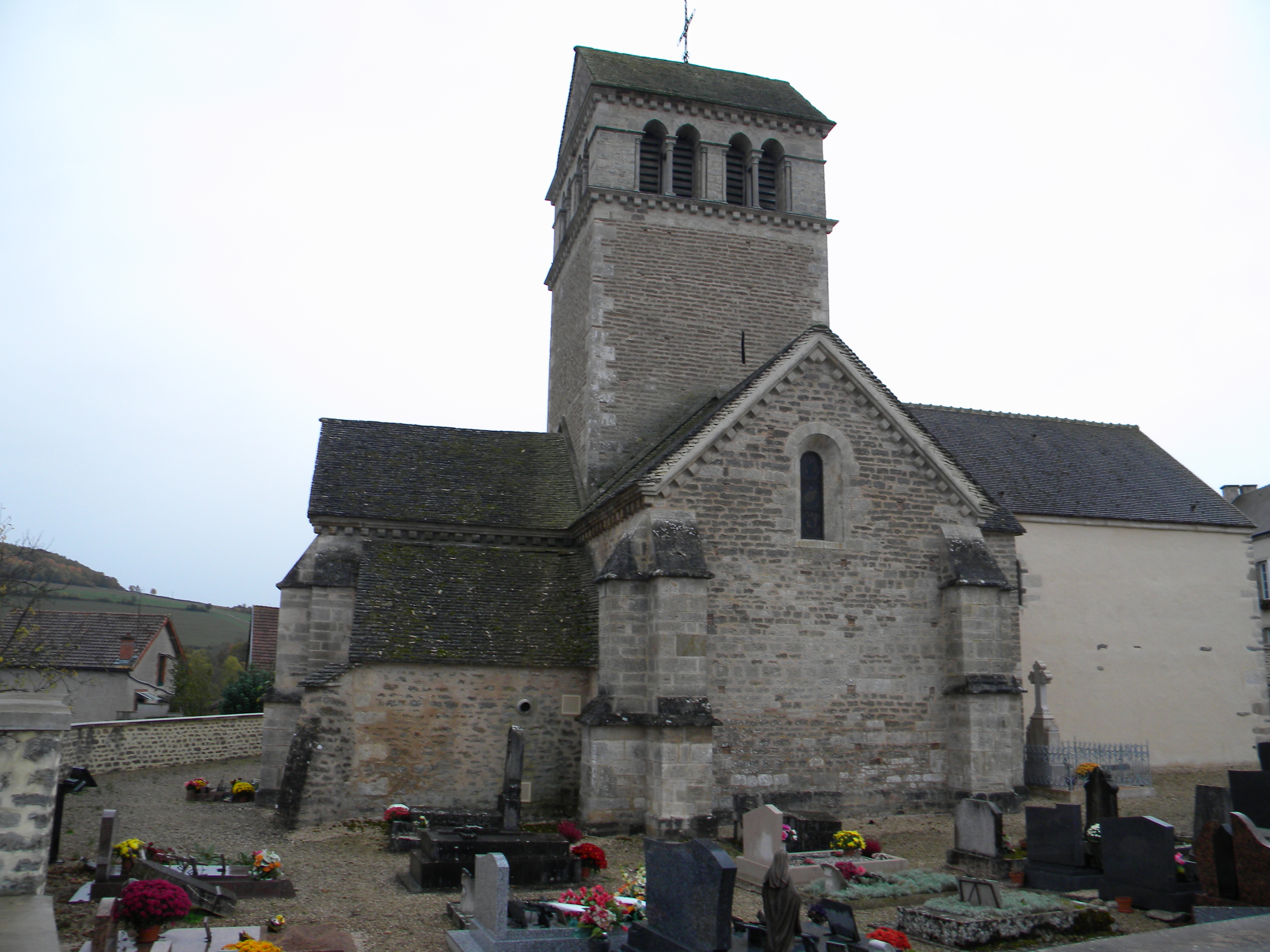 Vic-des-Prés